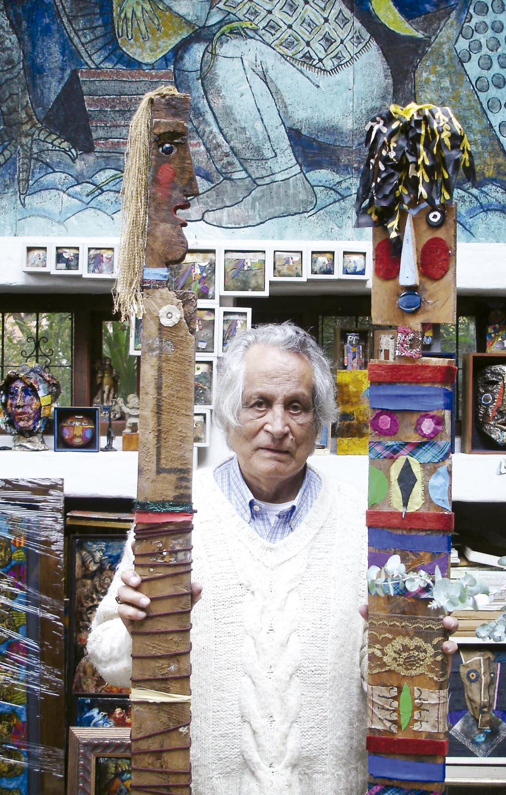 Foto del artista peruano Armando Villegas realizada por Gonzalo Márquez Cristo